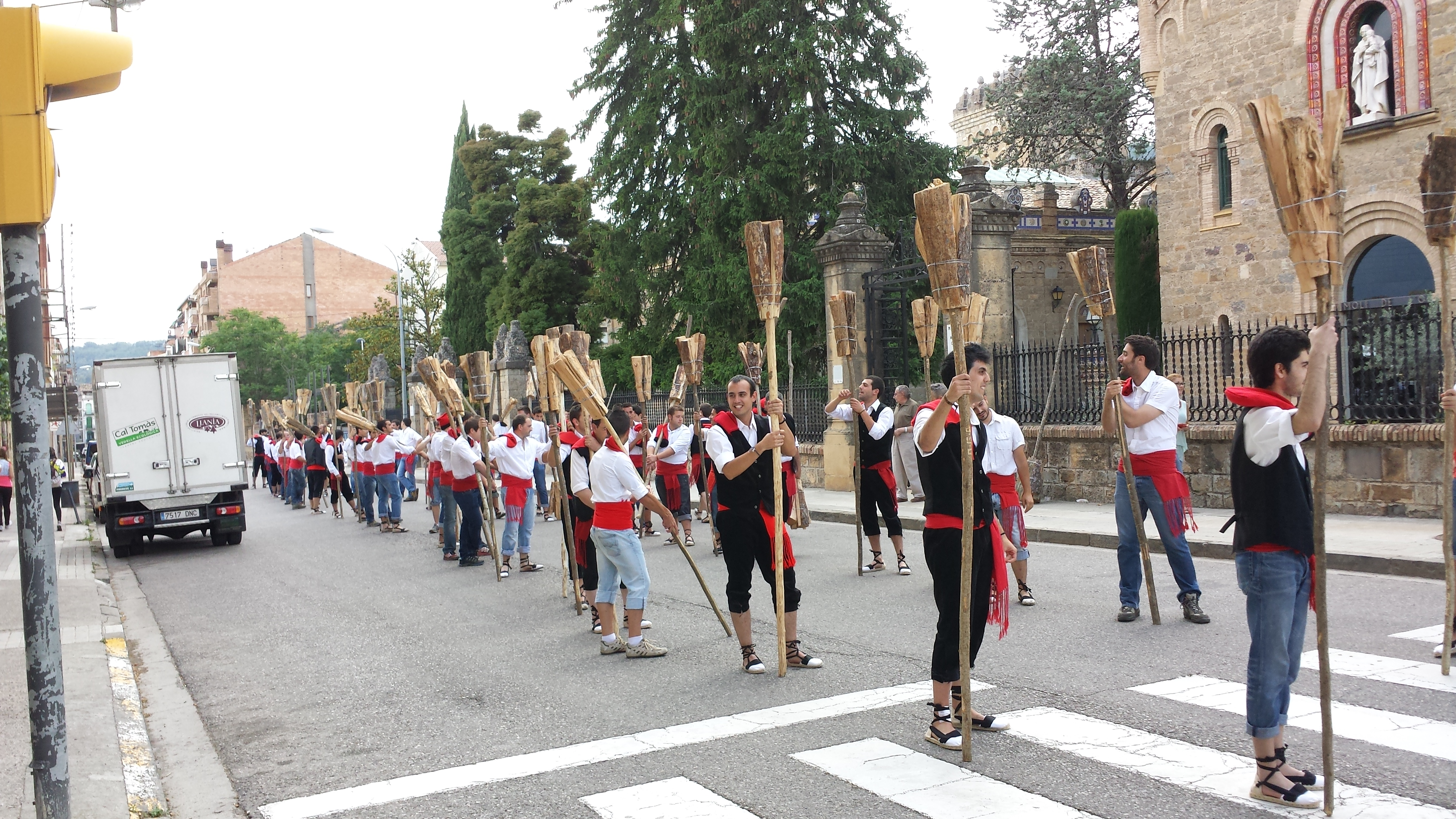 Instant abans de començar la desfilada dels fallaires del 2016, amb el Molí de l'Oli i l'ajuntament radera.